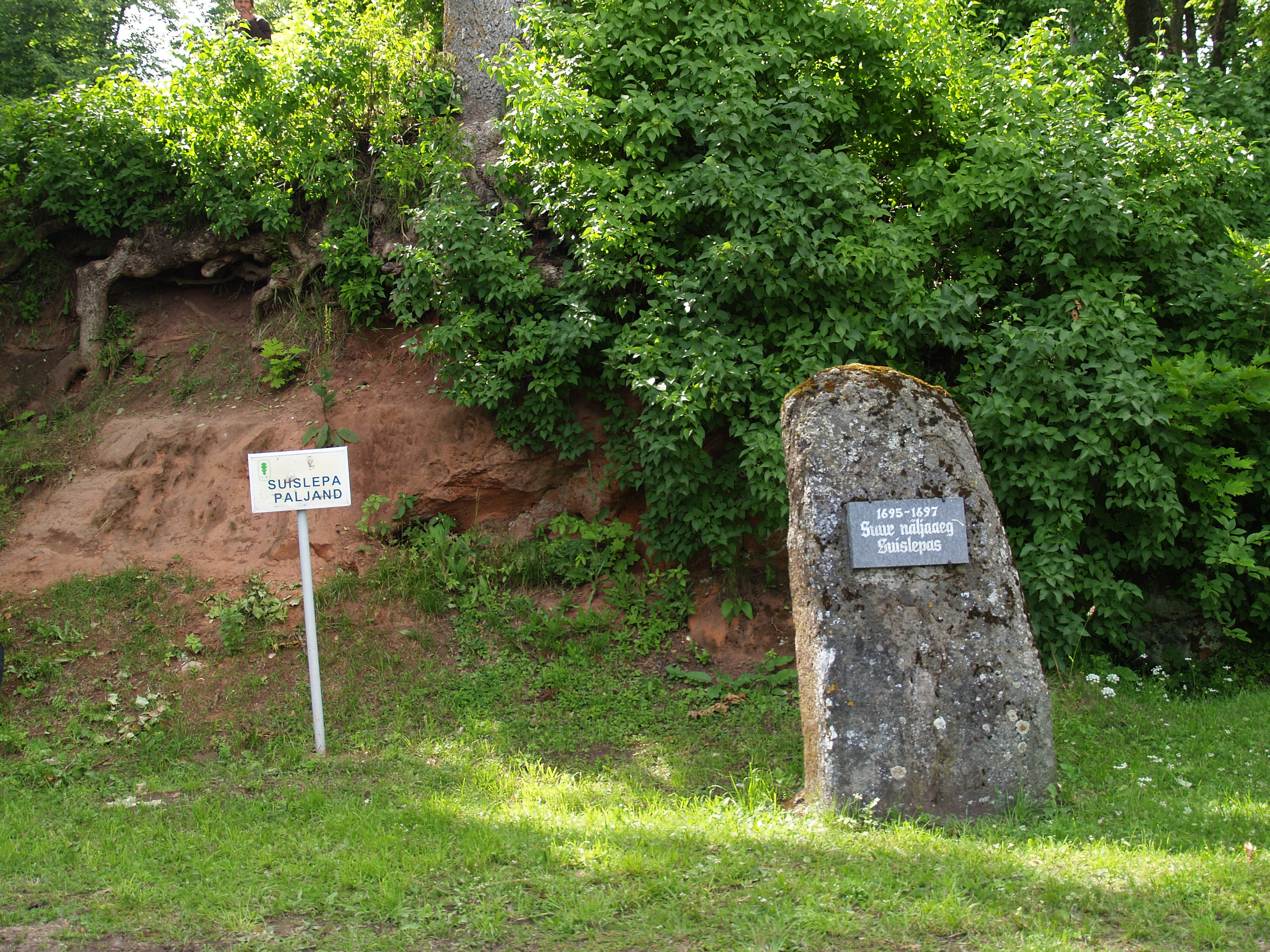 Suislepa paljand